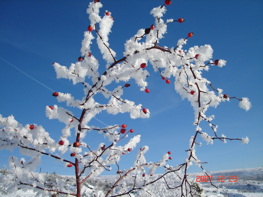 Dérlepte ág (Kézdialmás, Székelyföld)